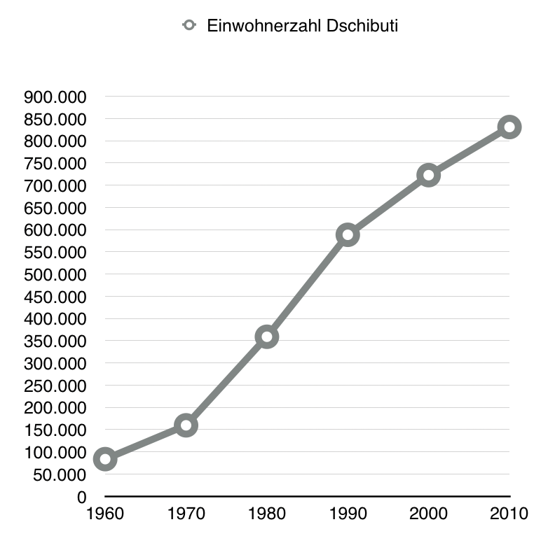 Diese Grafik zeigt die Einwohnerzahl Dschibuti